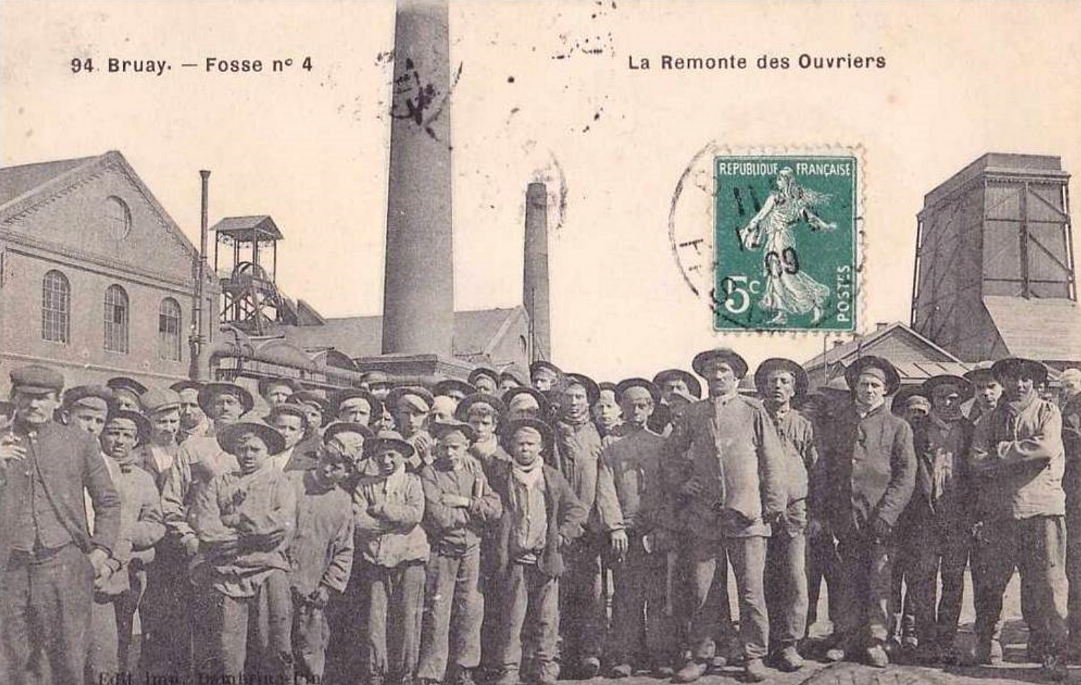 La Fosse n° 4 - 4 bis - 4 ter de la Compagnie des mines de Bruay était un charbonnage constitué de trois puits situé à Bruay-la-Buissière, Pas-de-Calais, Nord-Pas-de-Calais, France.